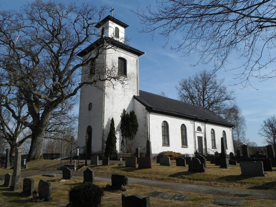 Källsjö kyrka från SV